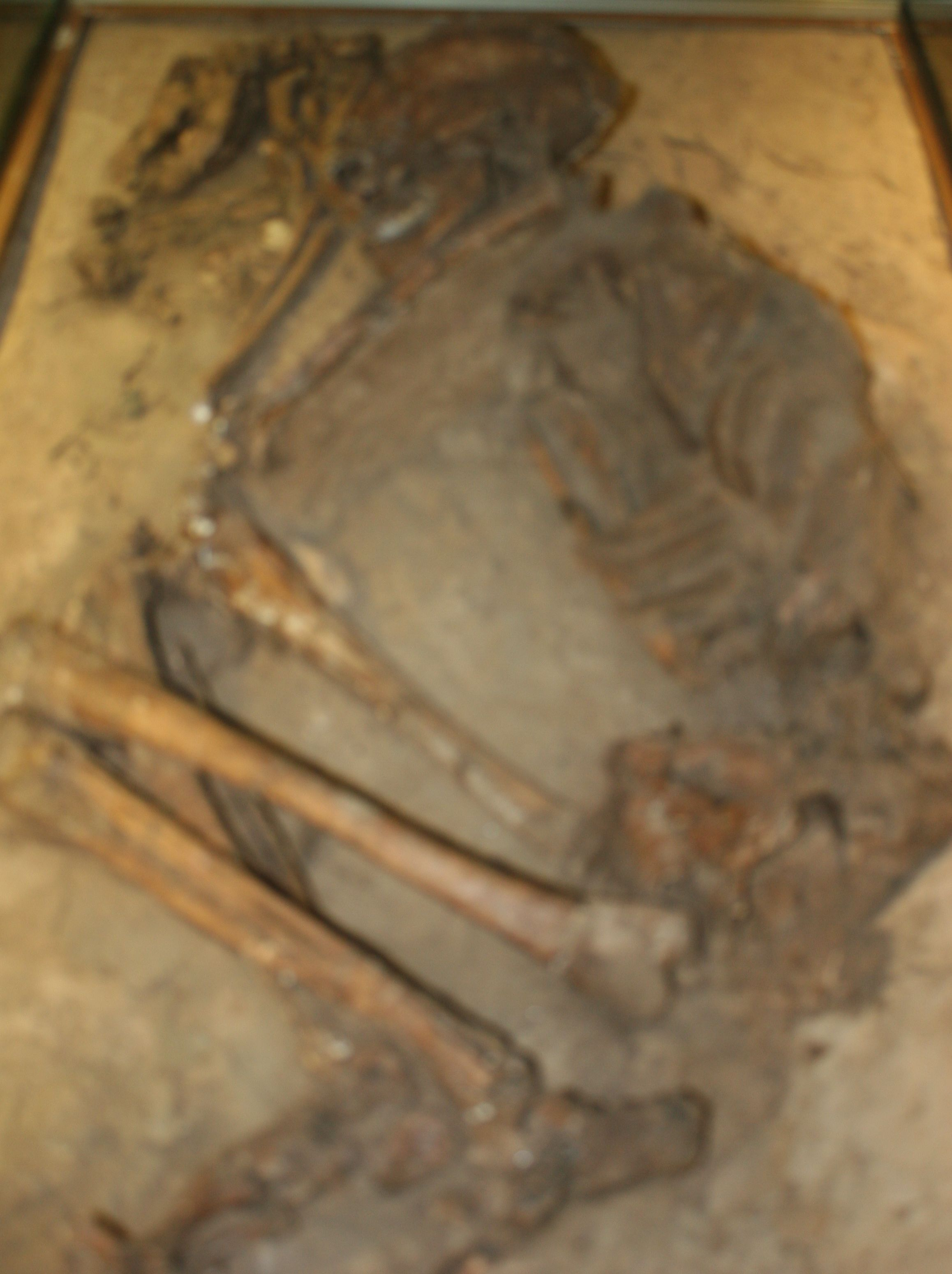 קבורת אדם וכלבלב יחדיו -מוזיאון האדם הקדמון -מעיין ברוך